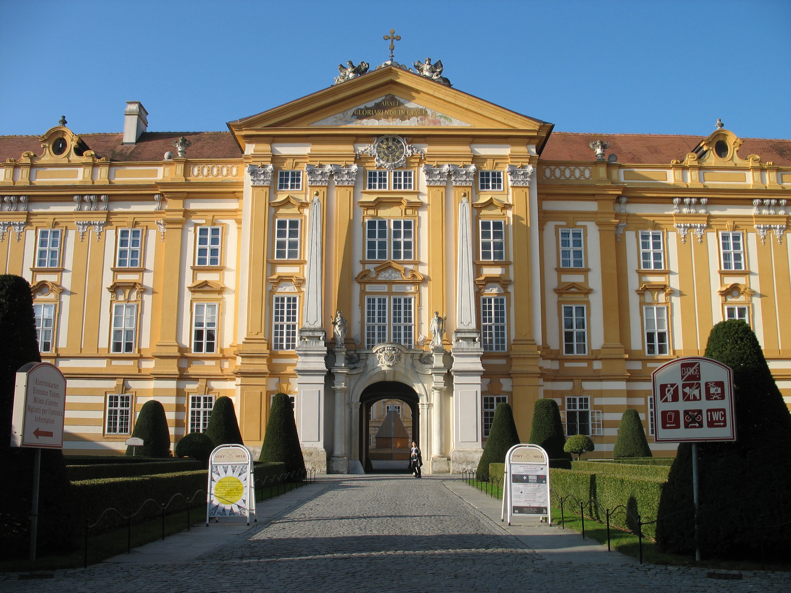 Stift Melk